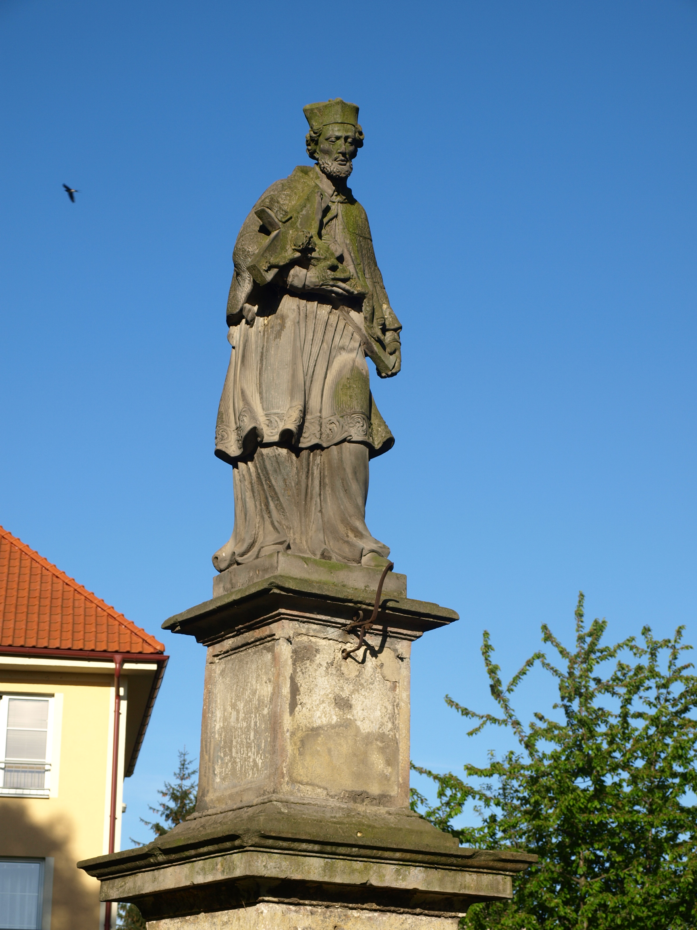 Kulturní památka, zapsána do státního seznamu pod č. 28282/2-1837 před r.1988.